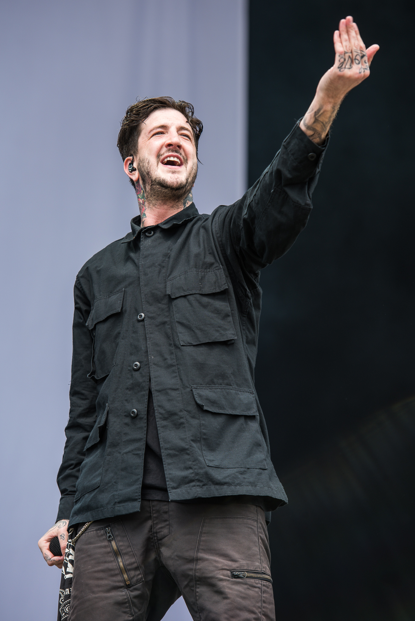 ARGO-Konzerte,Austin Carlile,Festival,Konzert,Livekonzert,Livemusik,Musik,Of Mice & Men,RiP,Rock im Park 2016,Seat Zeppelin Stage